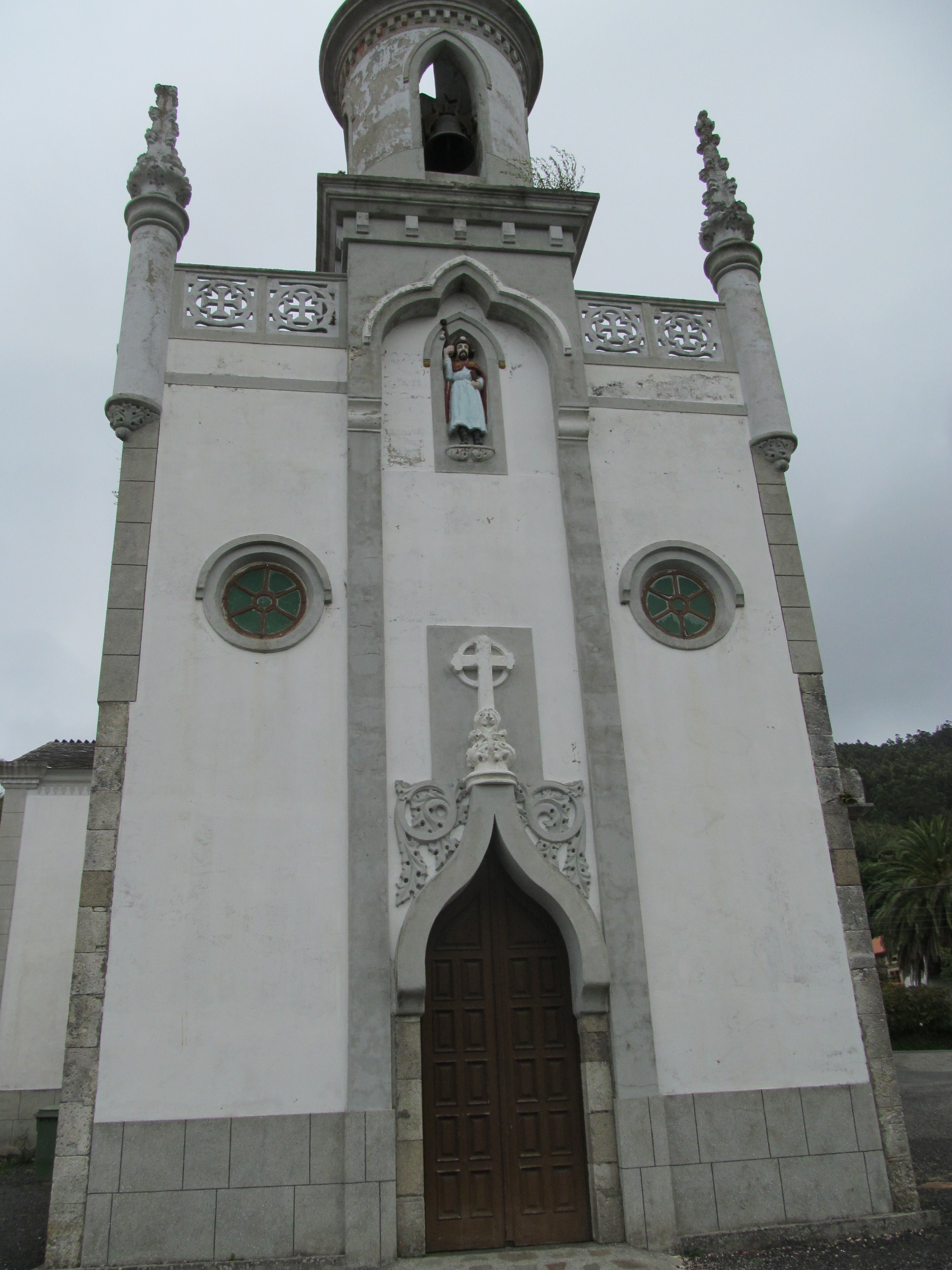 Iglesia parroquial de Santiago de Pantín, un templo de estilo ecléctico con planta de cruz latina, se encuentra en Valdoviño (Galicia), España.